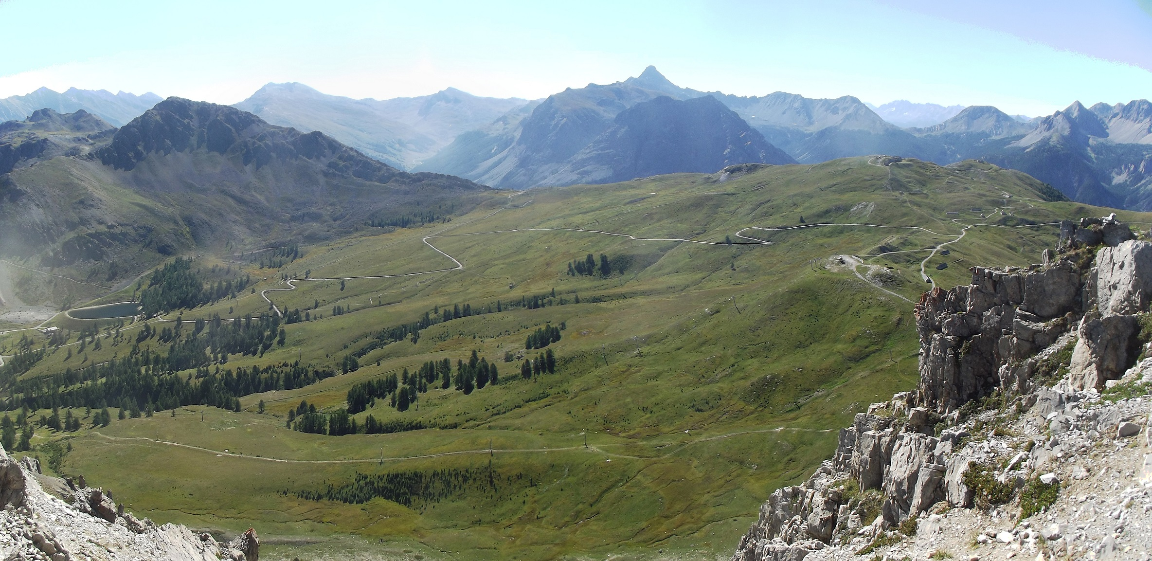 Sources de la Durance : partie amont du bassin versant